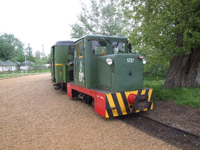 A GV 5727-es pályaszámú C–50-es dízelmozdony a Balatonfenyvesi Gazdasági Vasút Balatonfenyves GV állomásán.